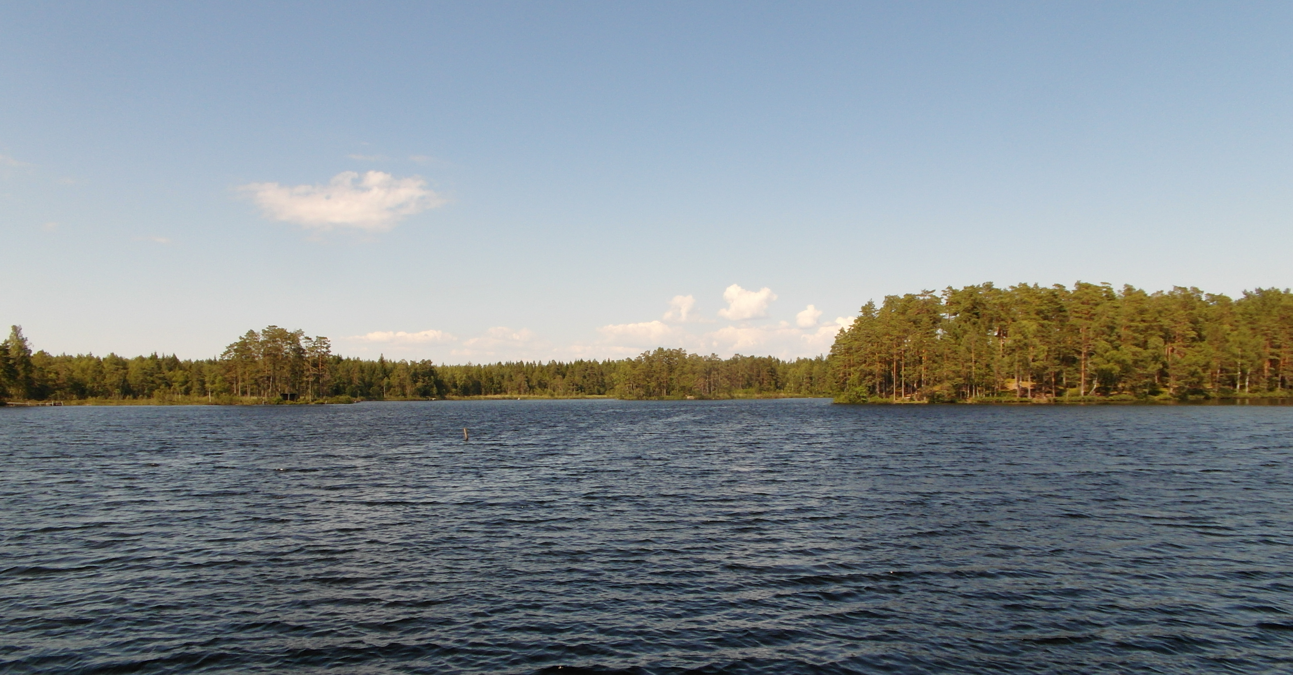 Holmsjön i Åkers bergslag, Strängnäs kommun, Södermanland